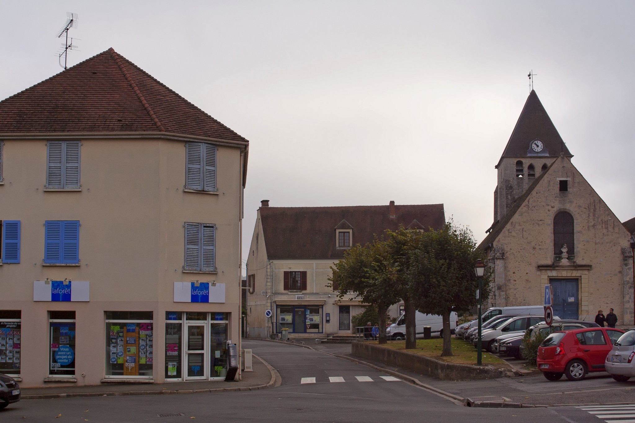 Ville de Plaisir (78) , ses commerces , son église .